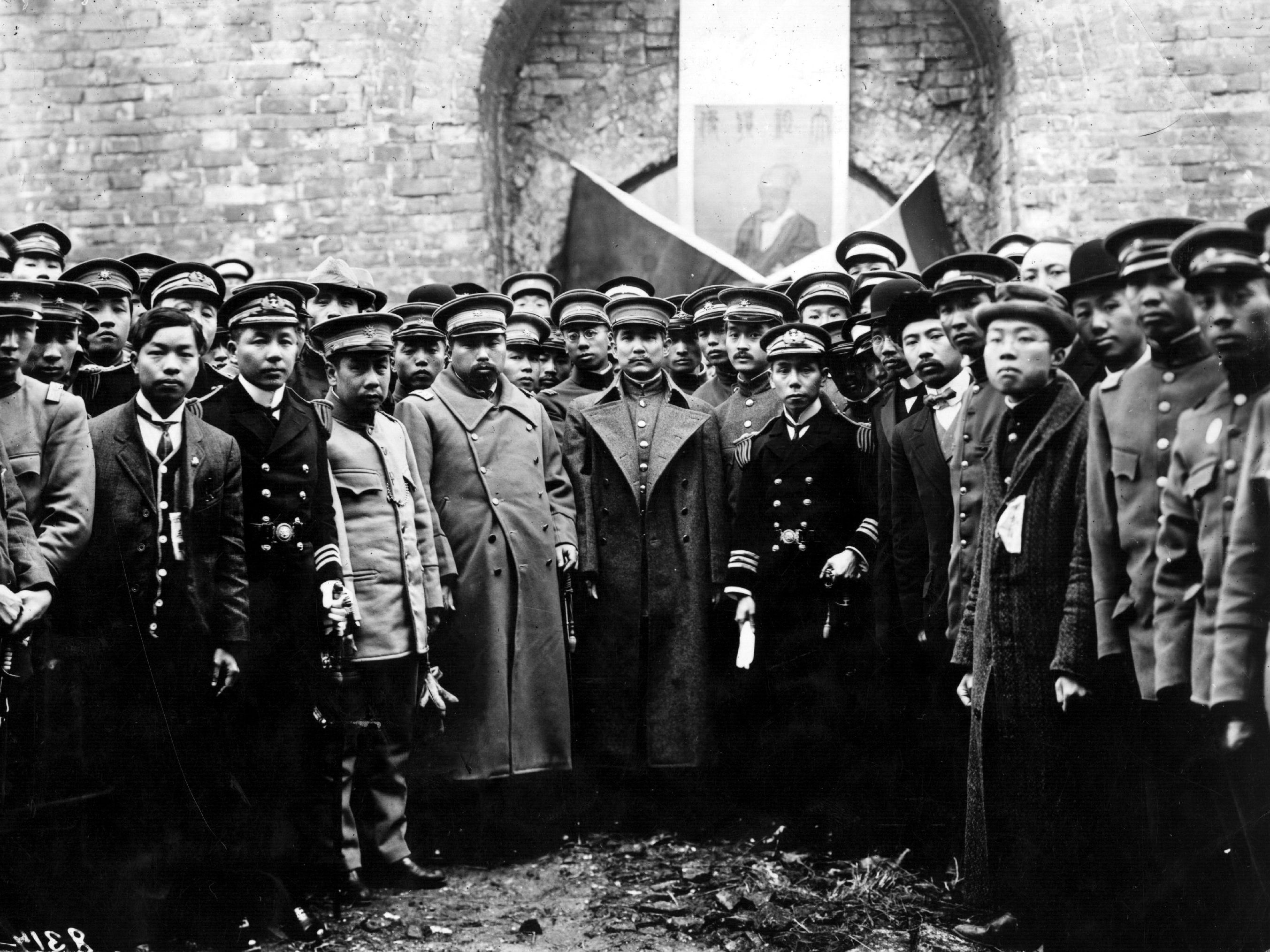 1912年2月12日，清帝宣布退位，清王朝灭亡。15日上午11时，中华民国临时大总统孙中山率领南京临时政府文武官员二百余人及军士数万人拜谒明孝陵，行祭告典礼以昭告光复。前排左5徐绍桢、左6黄兴、左7孙中山、左8黄钟瑛。照片由上海同生照相馆拍摄。